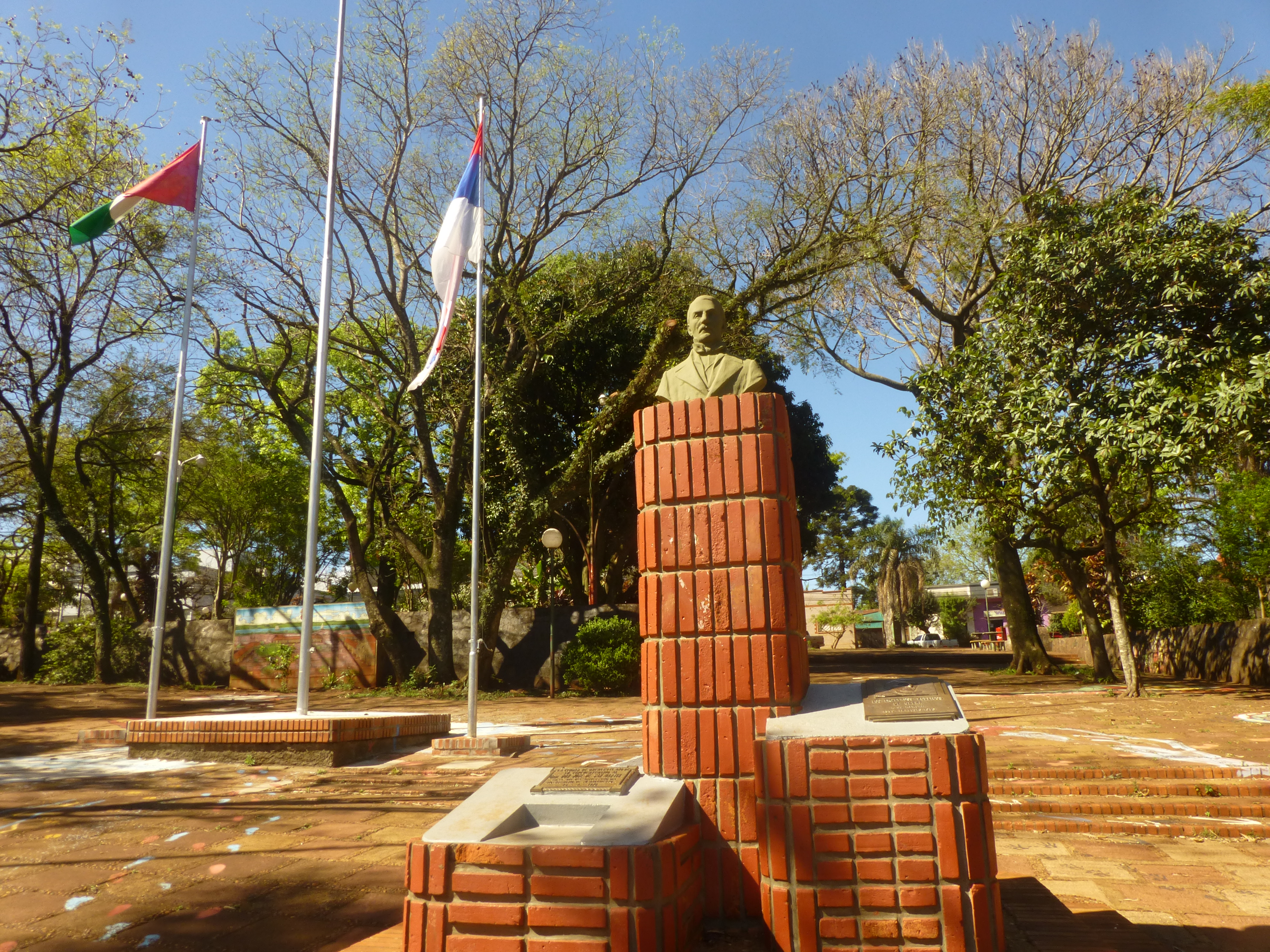 Plaza San Martín